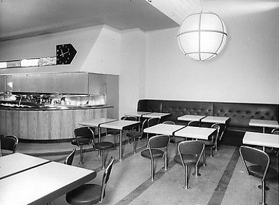 Restaurang Norma Odenplan med inredning av Kjell Westin